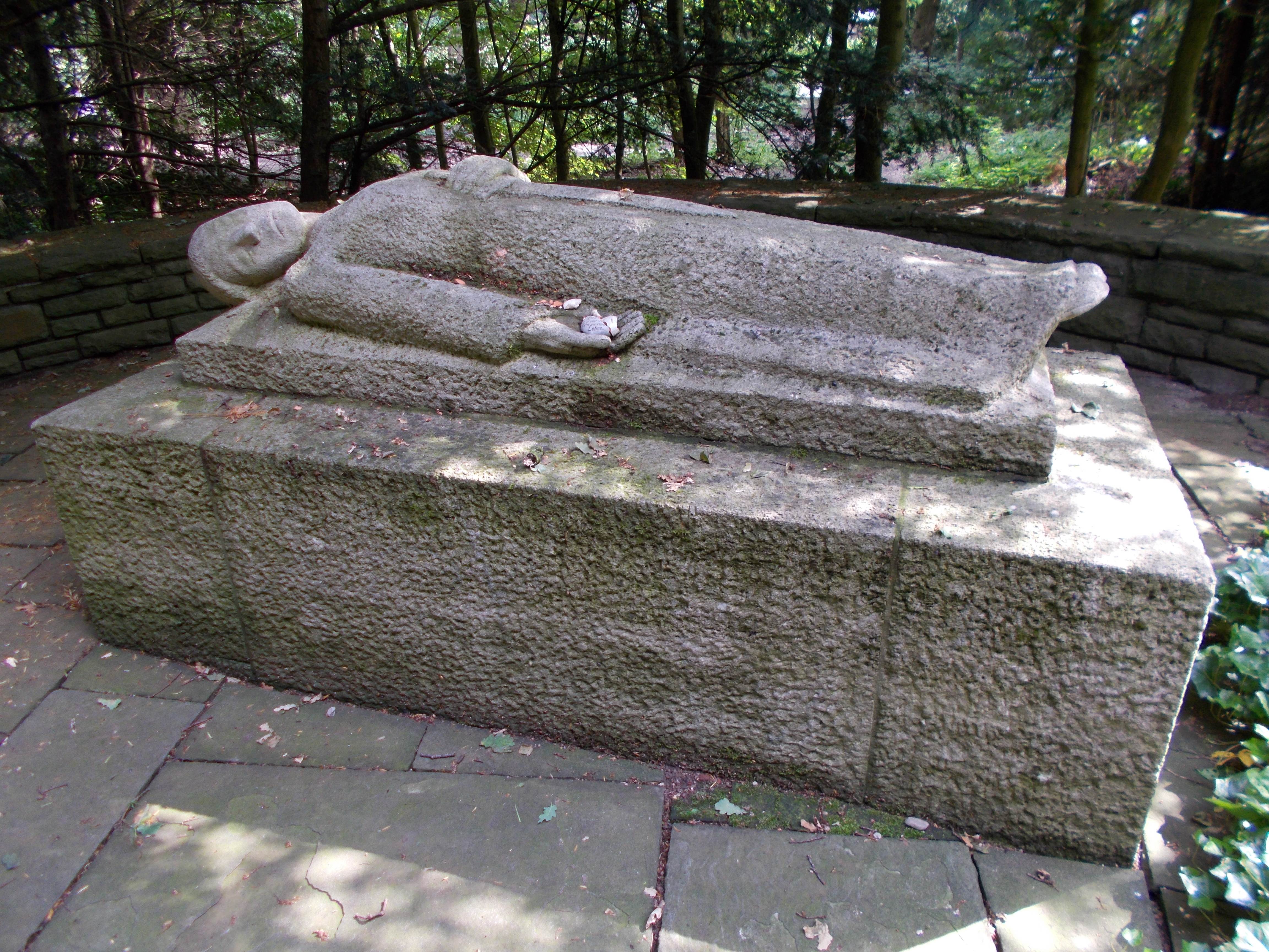 Deutscher Soldatenfriedhof am Niersenberg in Kamp-Lintfort. Mahnmal "Toter Soldat".